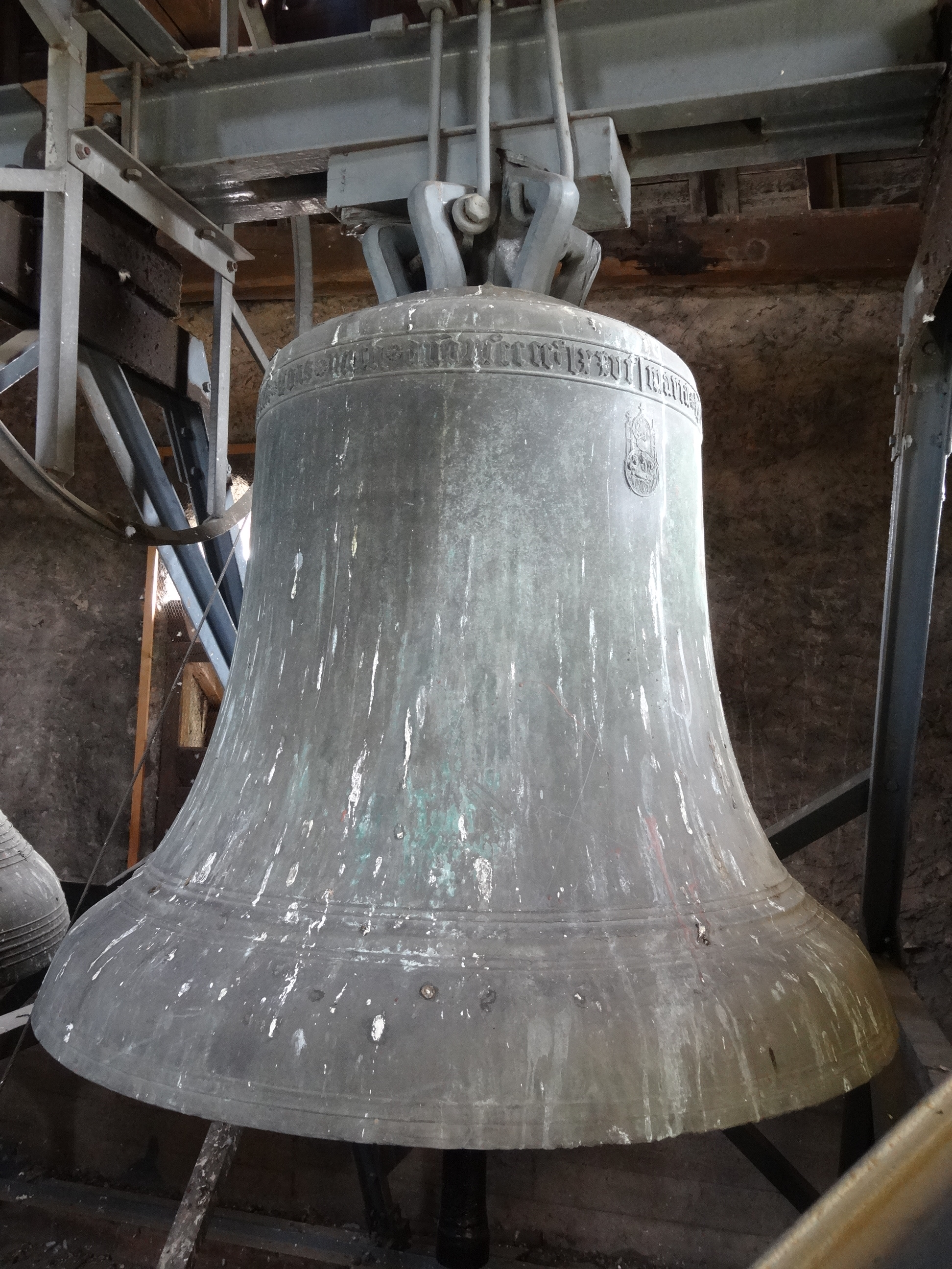 St. Peter (Großen-Linden)